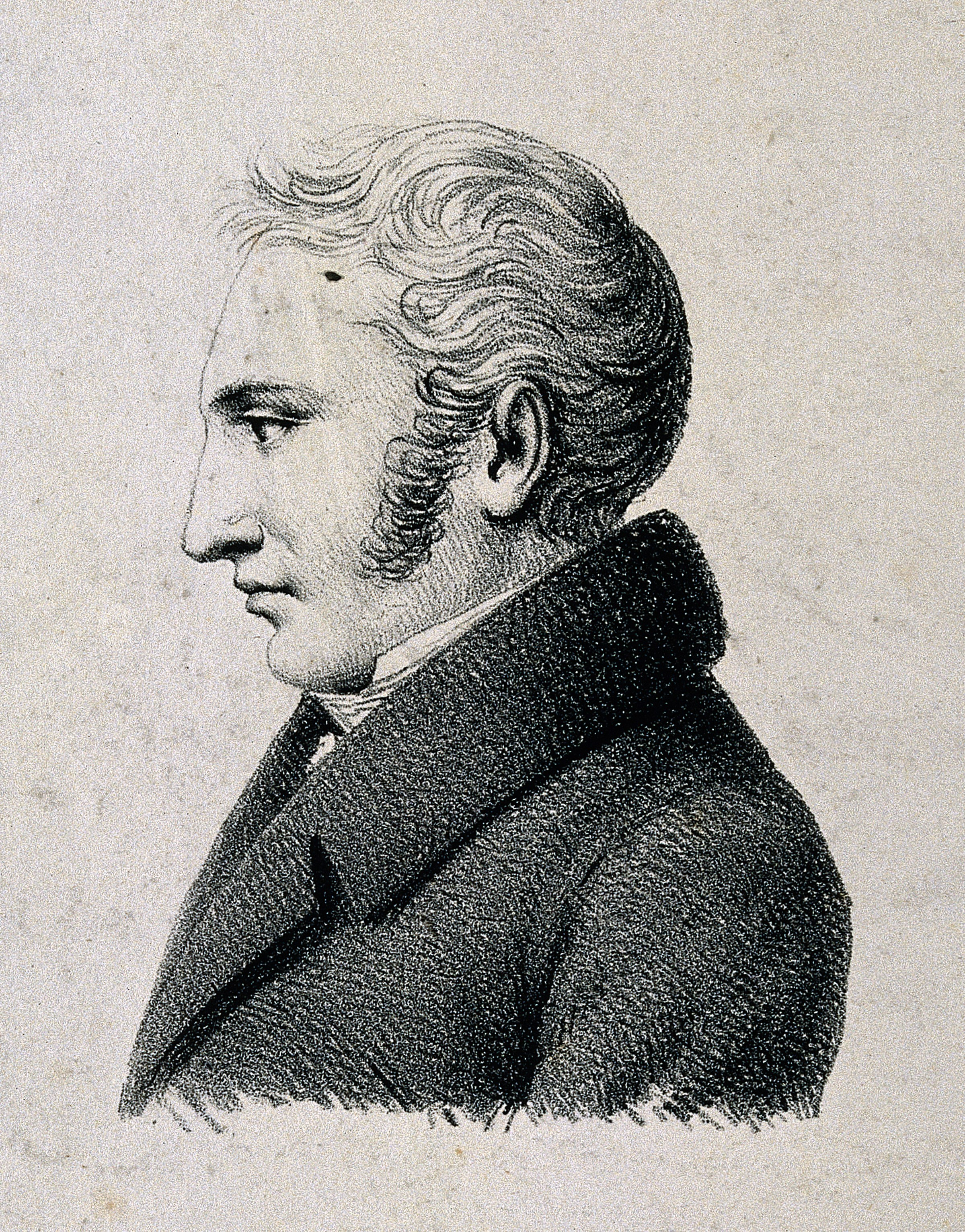 Genre/Technique: Portrait prints. Lithographs. Subject name: Castaing, Edme Samuel, 1796-1823.